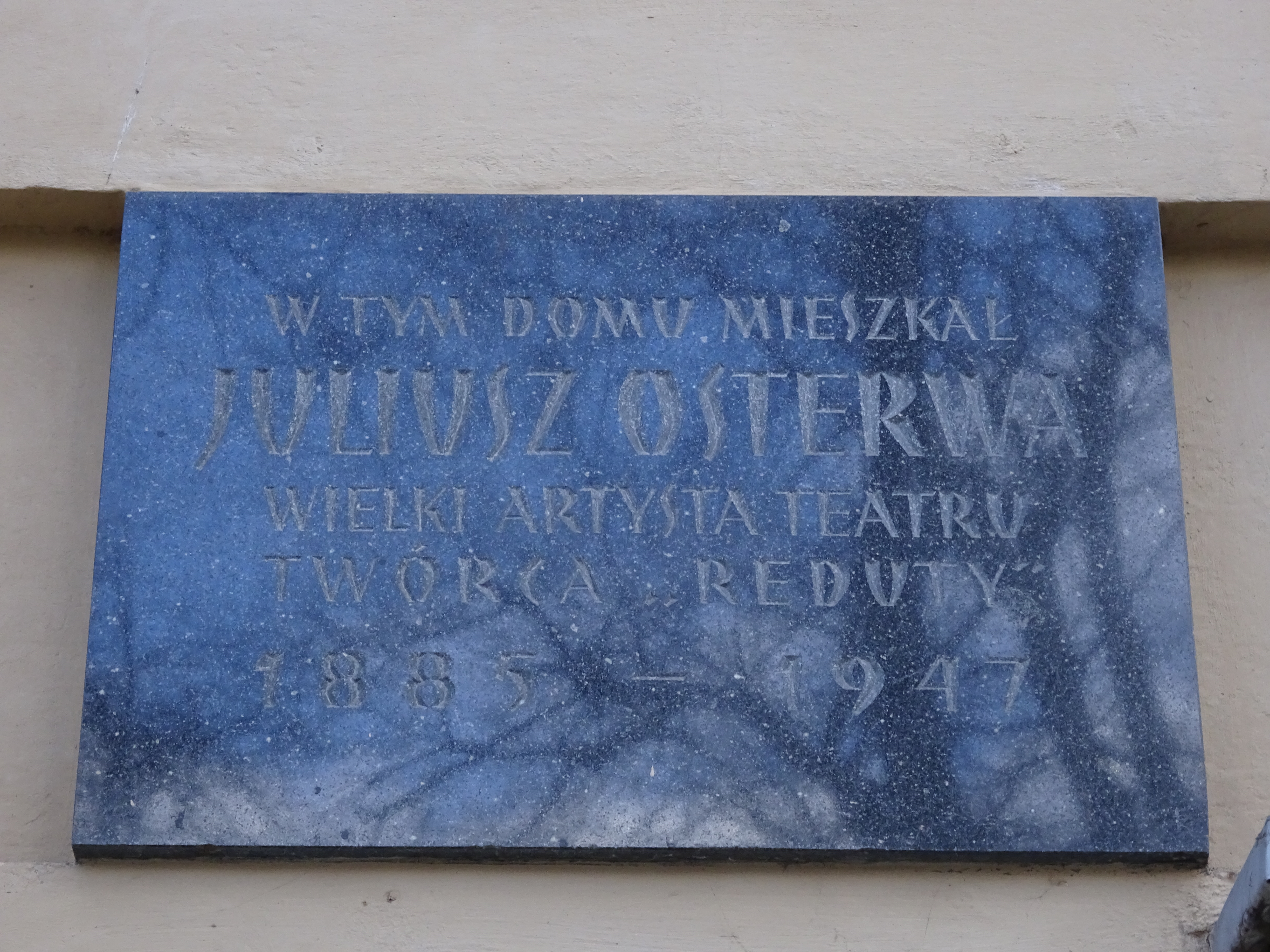 Ulica Pijarska 5 - tablica upamiętniająca zamieszkiwanie owej kamienicy przez Juliusza Osterwę. Kraków, 2017.